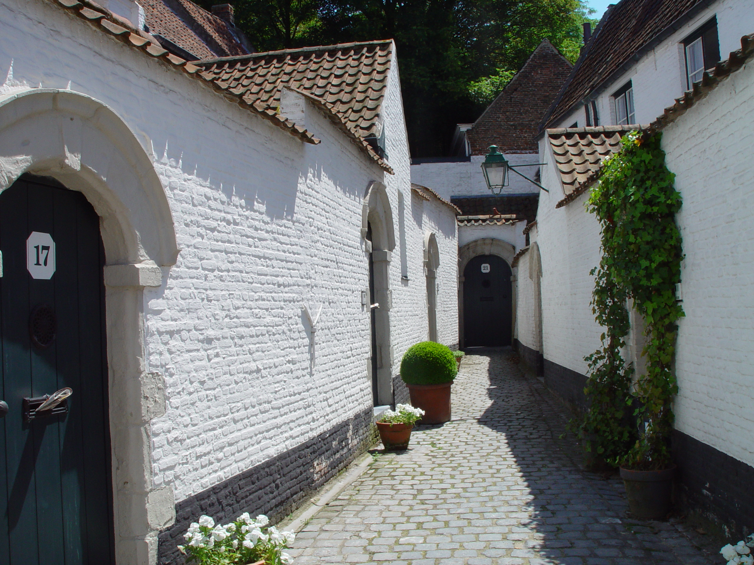 WOONHUIZEN. Vrij homogene bebouwing met bakstenen huizen van twee bouwlagen, onder pannen zadeldak, doorgaans met ommuurde voortuin/ koer met rondboogpoortje en bijgebouwtje tussen huis en muur. Enkel nrs. 1 en 2, beide van 1855, hebben drie bouwlagen; bij nr. 35 is door onderzoek in 1999 opgemerkt dat het in oorsprong om een éénlaagsbebouwing ging. Bron: WVL5 Auteurs: De Gunsch, Ann; De Leeuw, Sofie & Metdepenninghen, Catheline